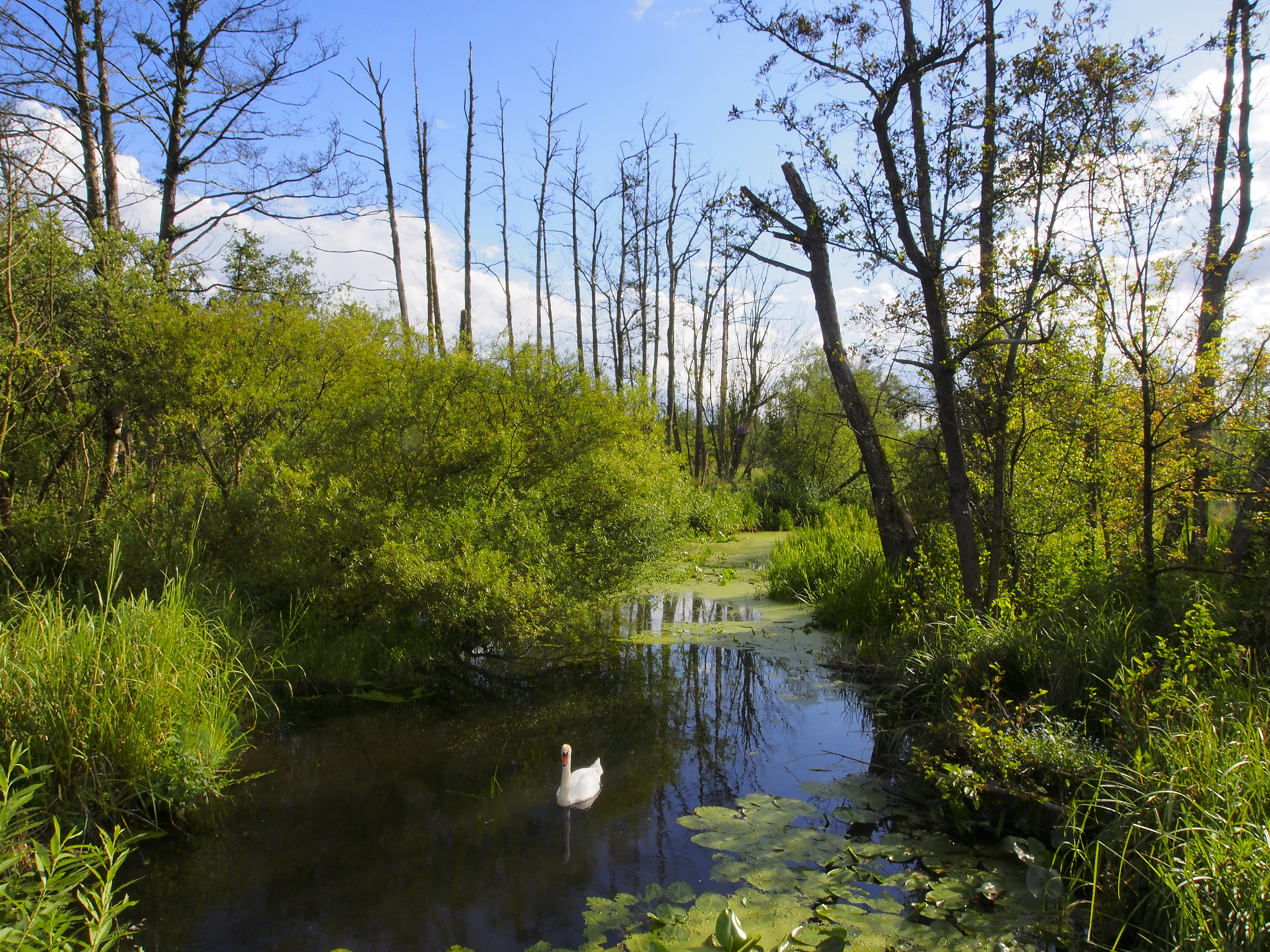 Das Tegeler Fließ nahe dem Eichwerder Steg: Ein grünes Band an Rande Berlins. (FFH-Schutzgebiet DE-3346-301)